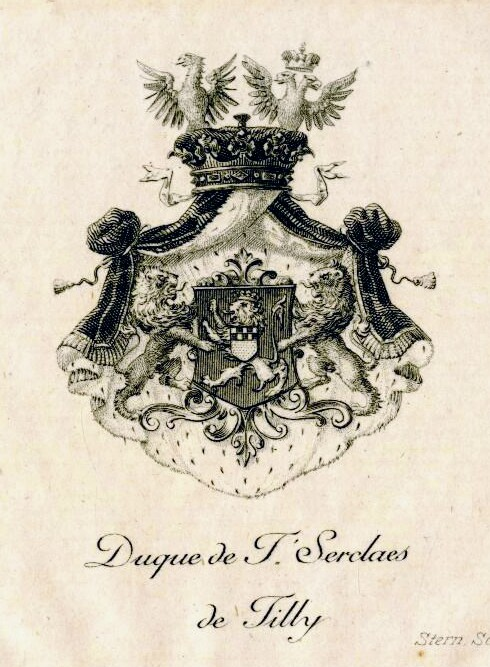 Wappen des Duque de T'Serclaes de Tilly (Herzog von T'Serclaes von Tilly), aus dem Hause Perez de Guzman